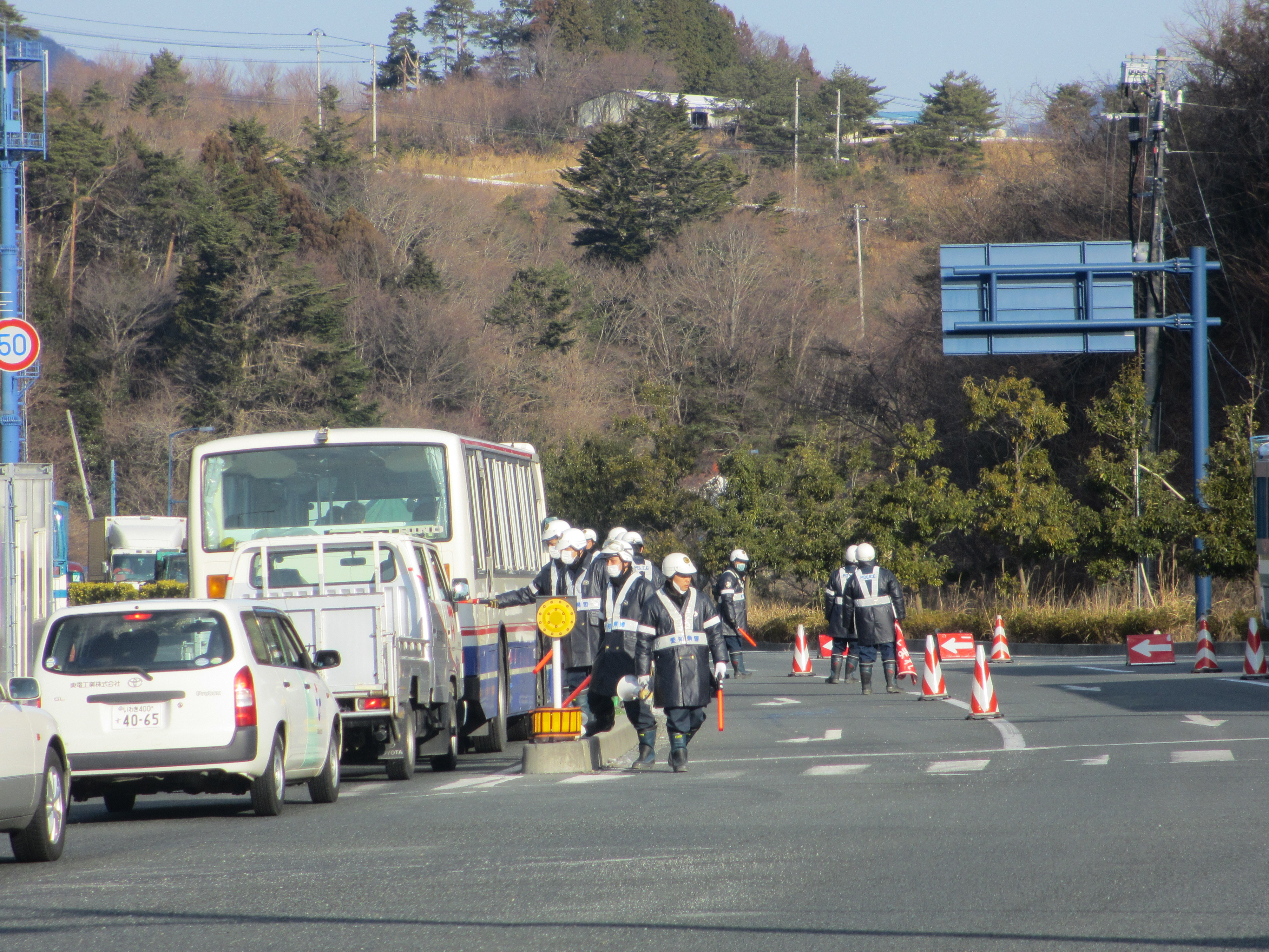 福島県楢葉町、国道6号上で撮影。警戒区域境界で検問を行う警察官。